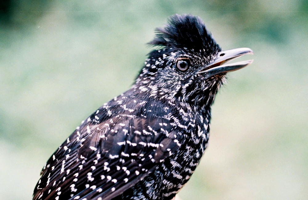 Thamnophilus tenuepunctatus Birds of Serranía de Perijá of Colombia and Venezuela (Ornitologia Colombiana [2014] 14: 62–93)